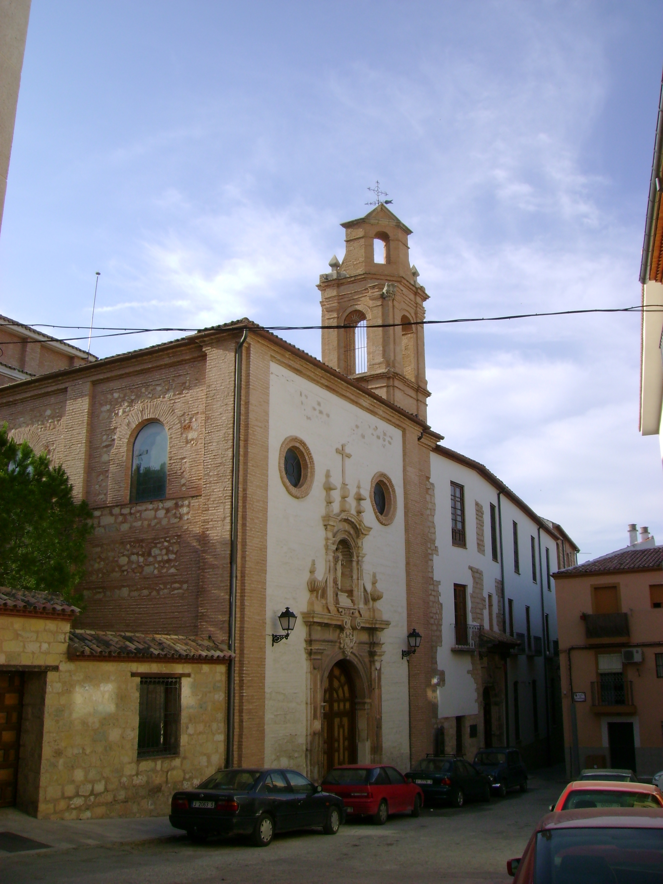 Antiguo Hospital de San Juan de Dios de Jaén.